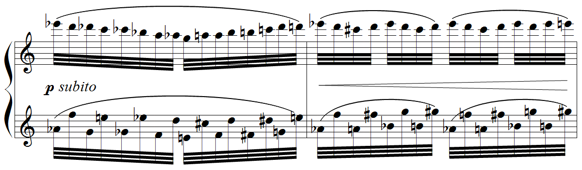 Debussy - Etude "pour les degrés chromatiques", mes. 59-60